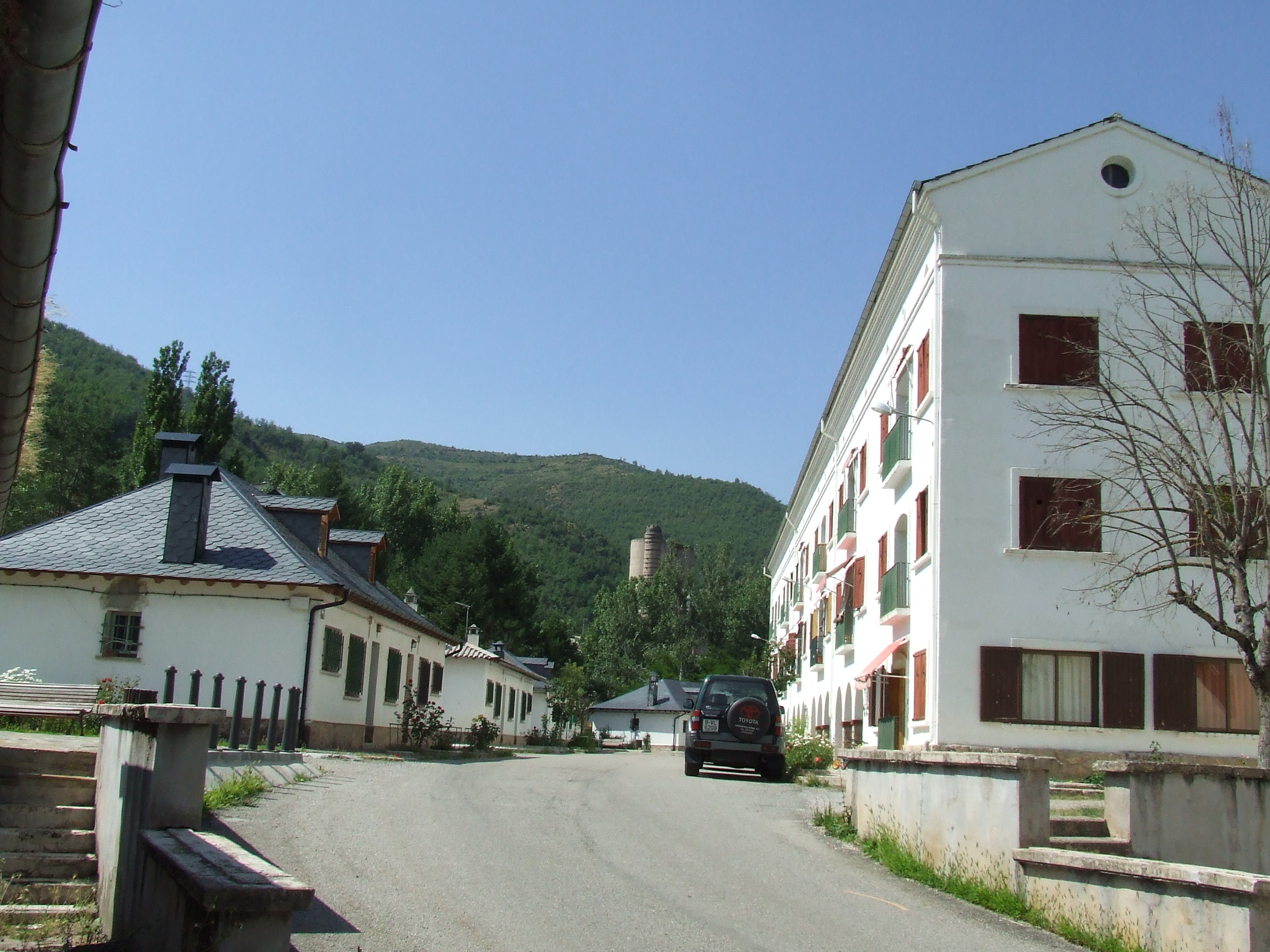 El poble de Xerallo (Sarroca de Bellera, Pallars Jussà)